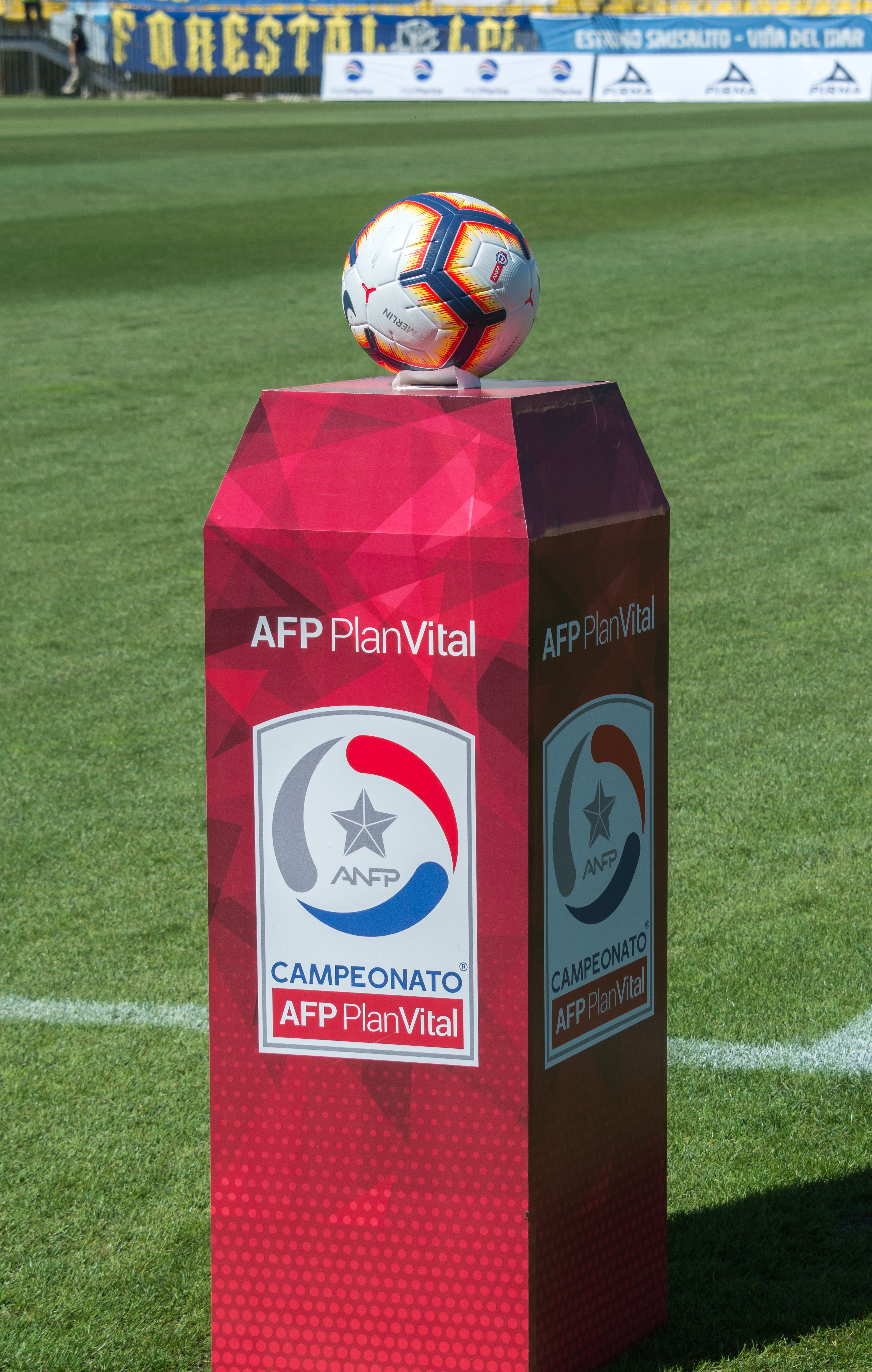 Everton v Unión La Calera, Estadio Sausalito, Viña del Mar, Región de Valparaíso, Chile.